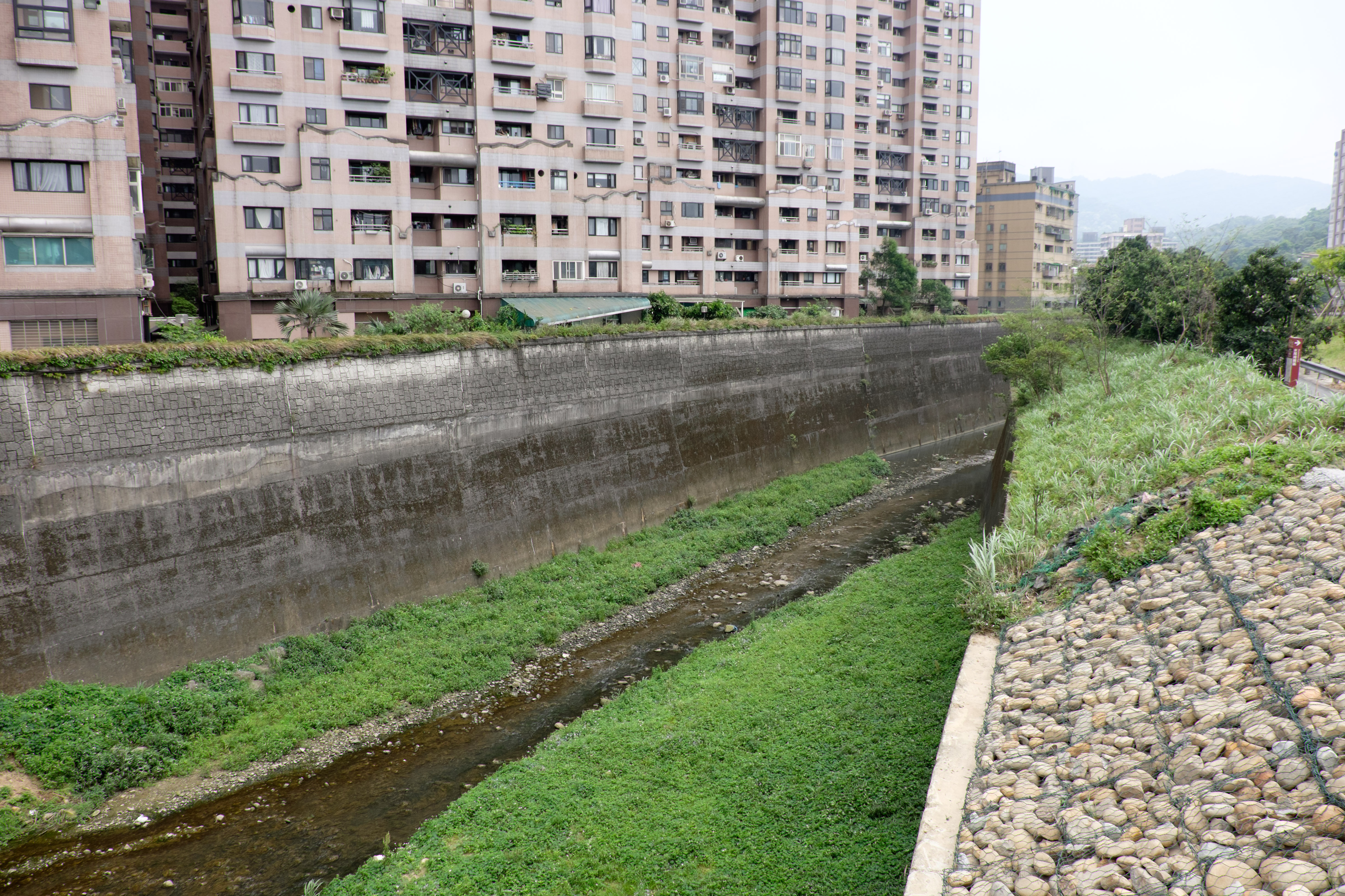 中文（台灣）: 新北市汐止區康誥坑溪下游與基隆河合流處附近。